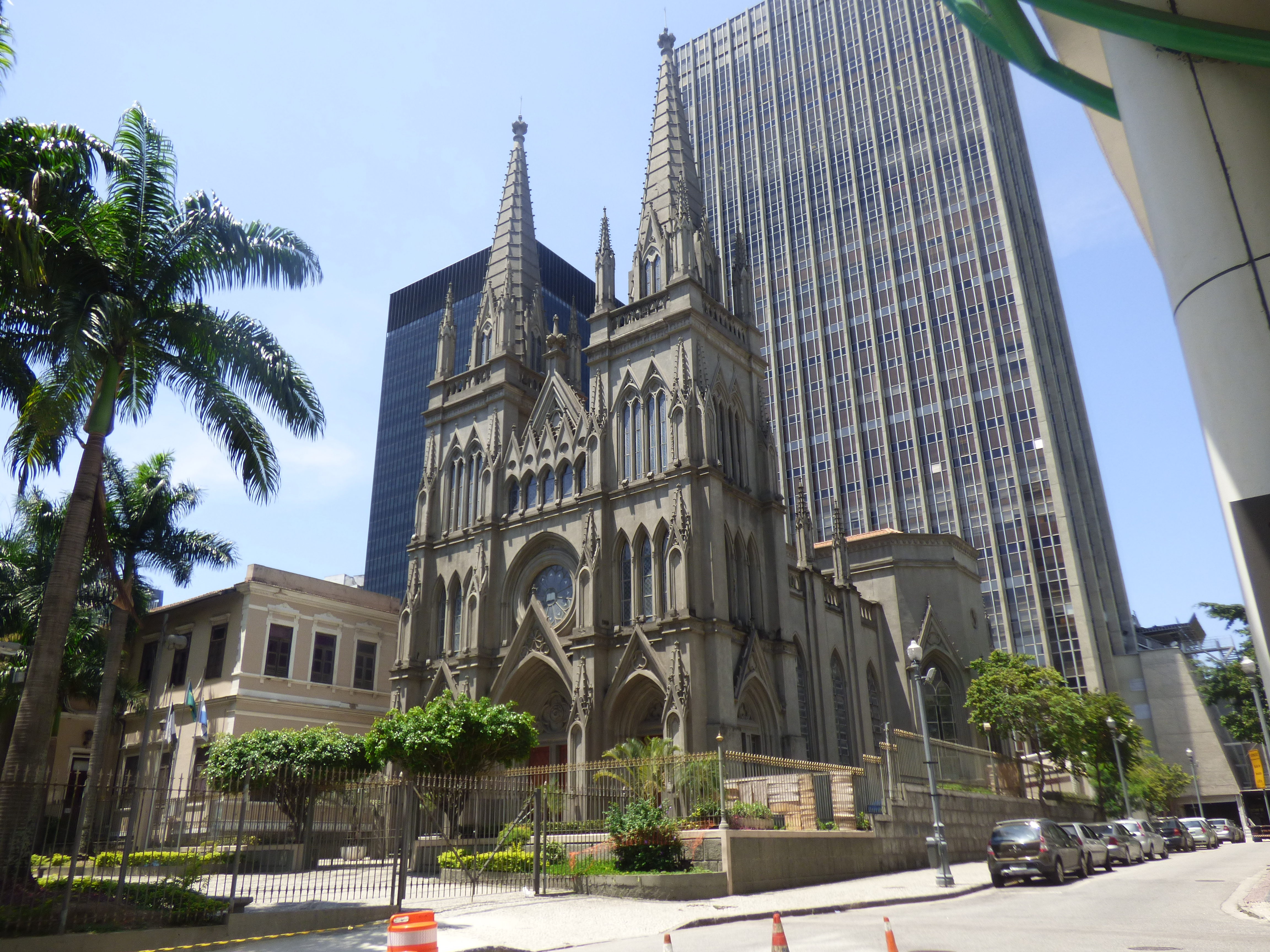 Catedral Presbiteriana de Río de Janeiro